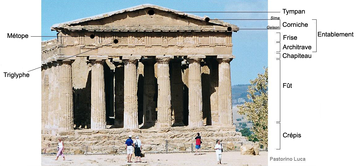 cette image représente les différentes parties d'un temple